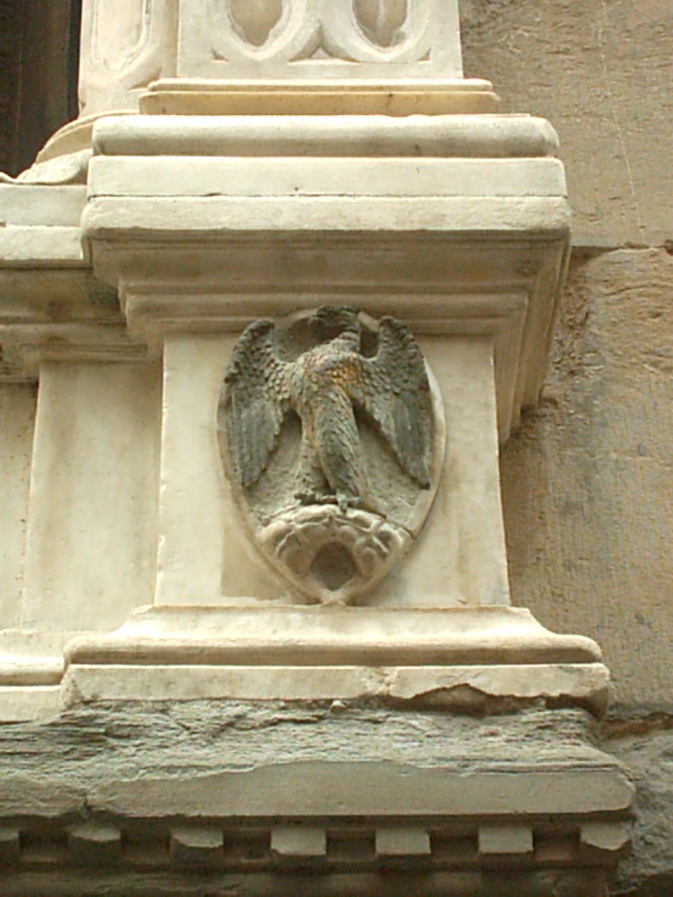 Stemma dell'arte di Calimala su un tabernacolo (nicchia esterna) della chiesa di Orsanmichele a Firenze